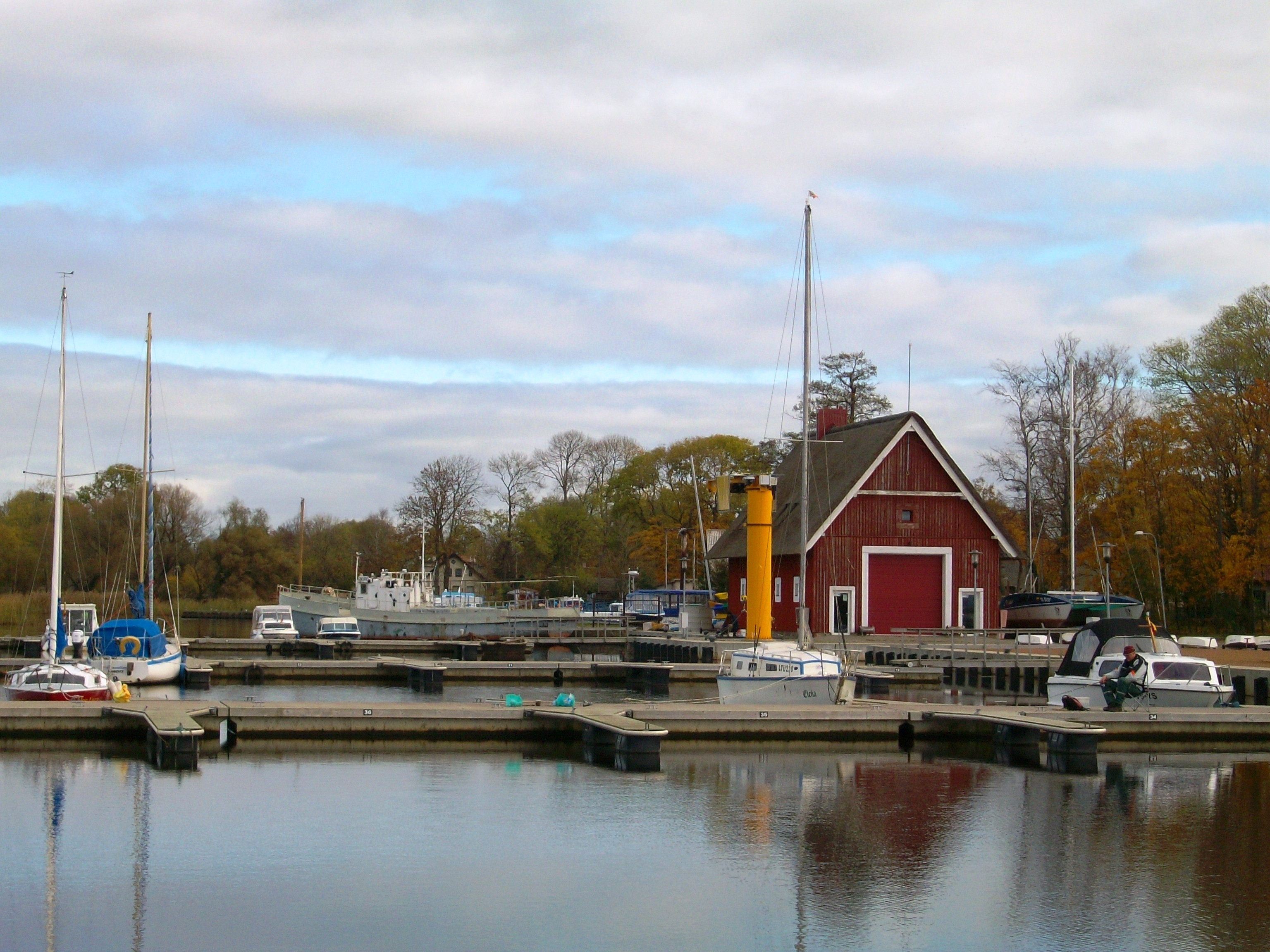 Drevernos krantinė